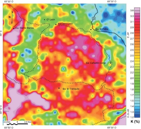 mapa de variación al norte de Santa Cruz.